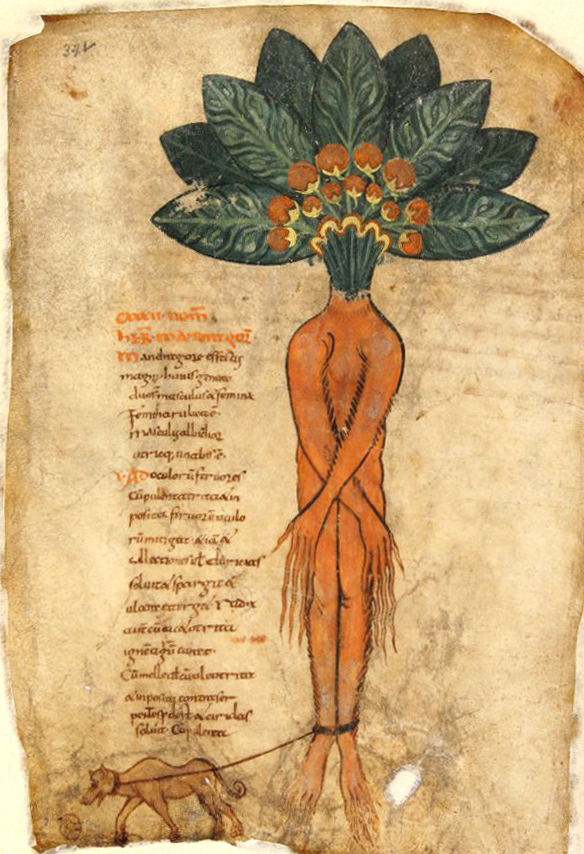 Abbildung der Alraunen-Ernte mit einem angeketteten Hund